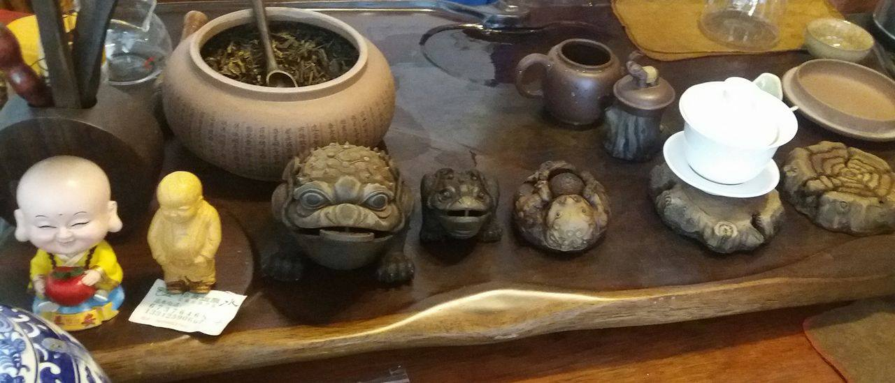 ჩინეთი, იუნანის პროვინცია. ჩინური ჩაის სიმბოლოები და ჭურჭელი